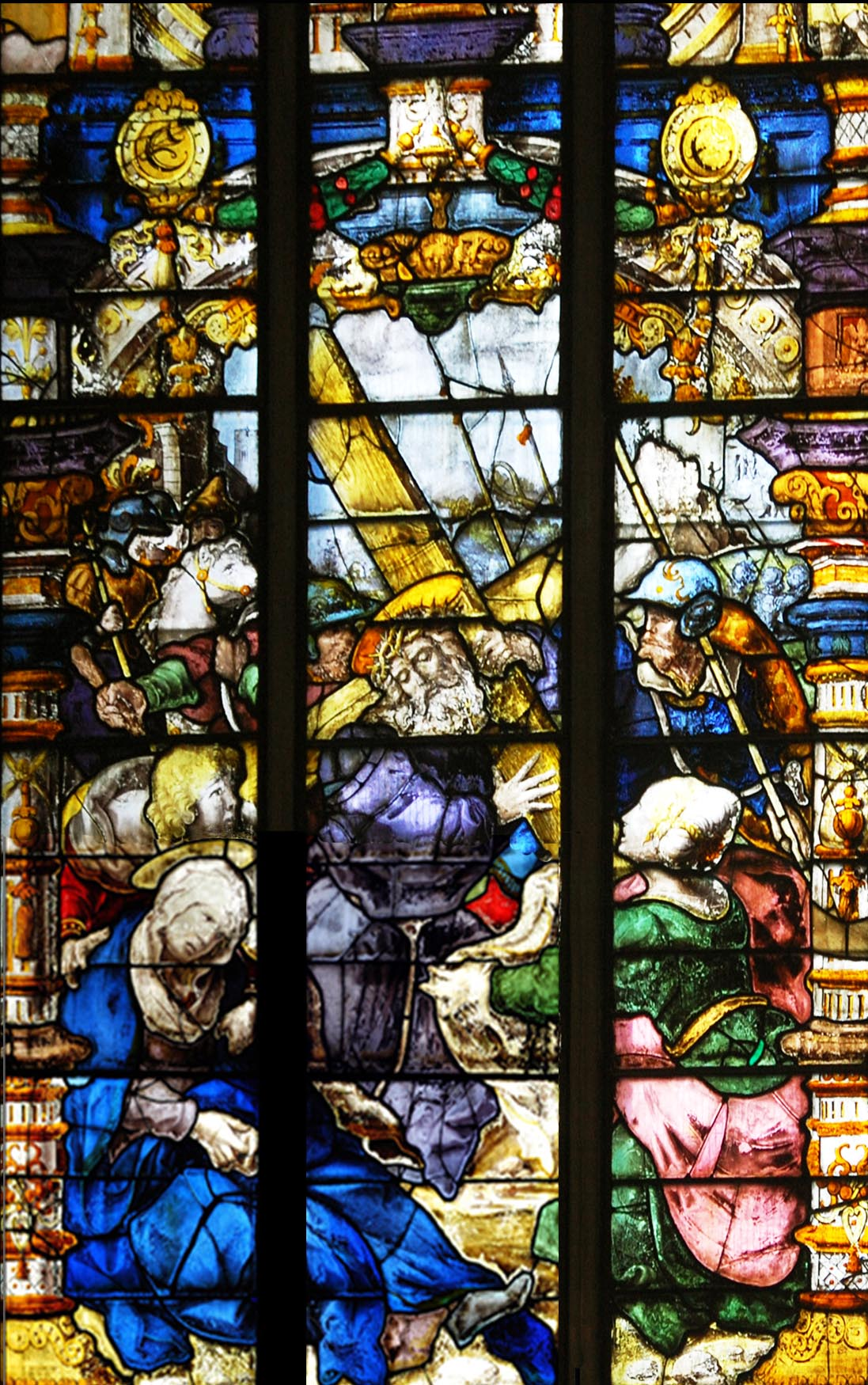 Glasraam afkomstig van de abdij van herkenrode, nu in de kathedraal van Lichfield